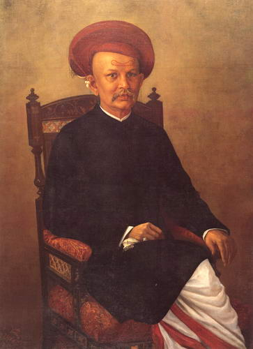 Raja Ravi Varma Painting of A gentleman